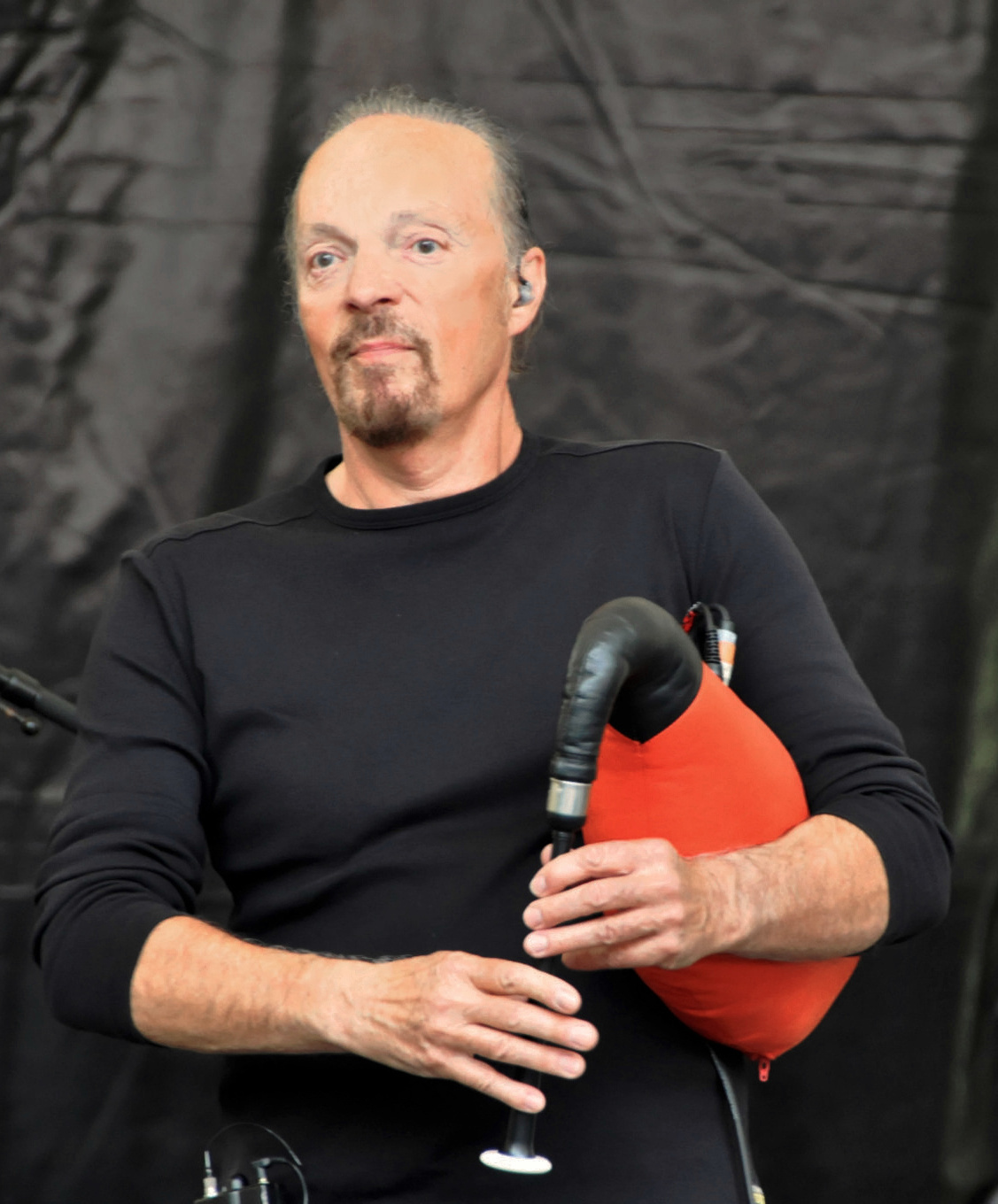 Alan Stivell en concert à Gourin lors du Championnat des sonneurs le 5 septembre 2010.